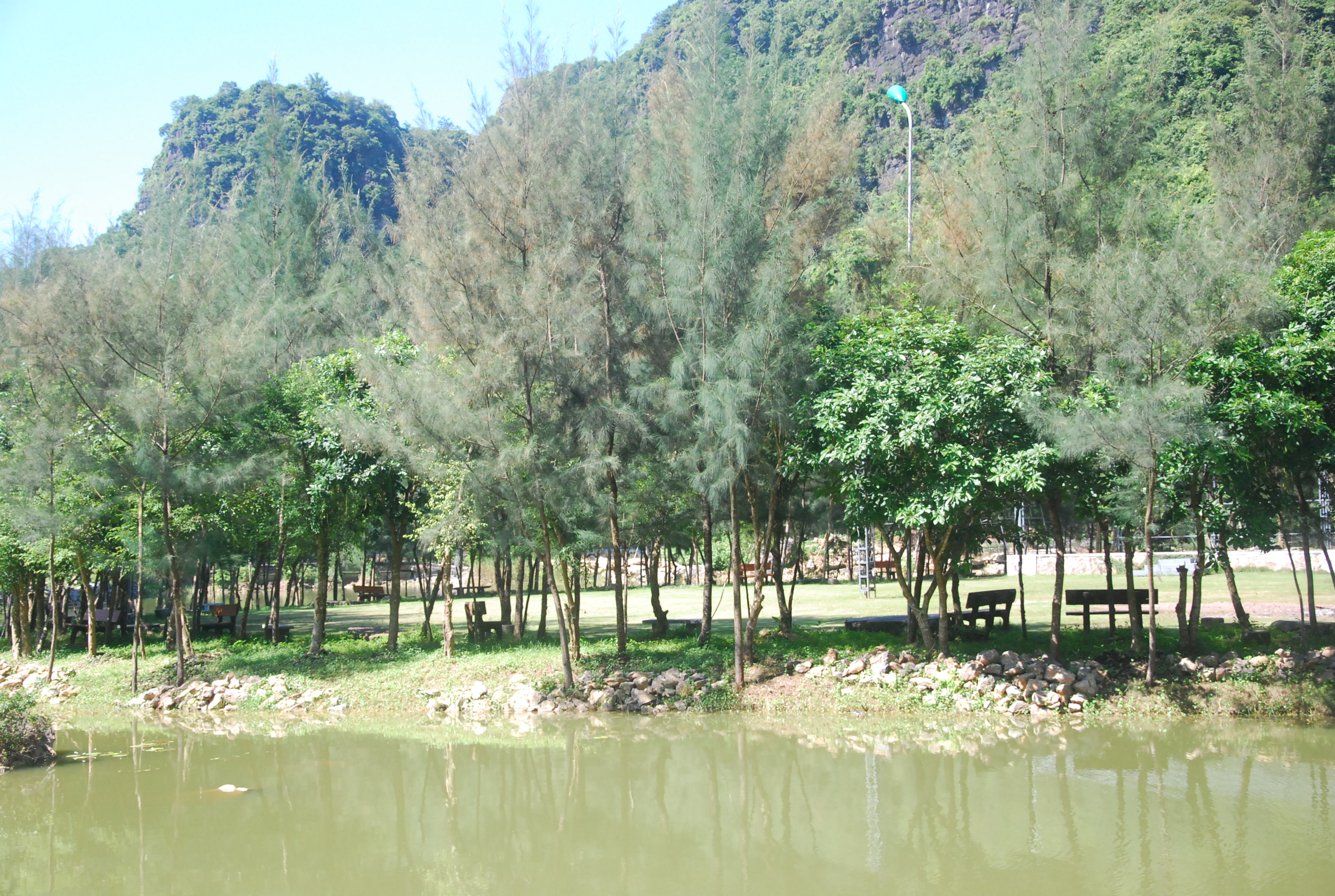 Phong cảnh Khu du lịch sinh thái Thung Nham ở Ninh Bình